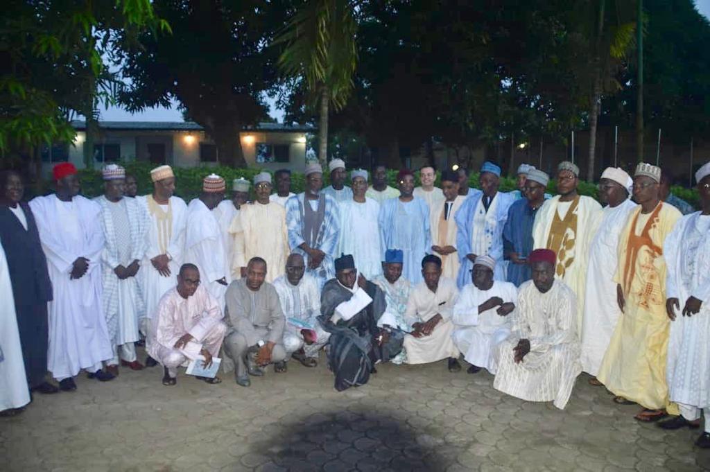 Réunion de la Conféderation du Grand Nord, association présidée par Bayero Fadil